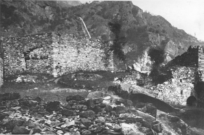 Interno e torre esagonale del Castello di Pont-Saint-Martin detto Castellaccio, Pont-Saint-Martin, Valle d'Aosta, Italia.